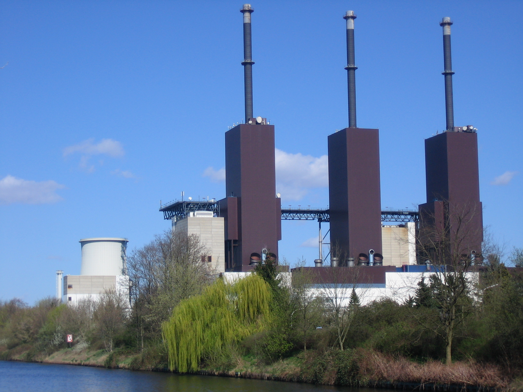 Kraftwerk Lichterfelde - Berlin, Germany